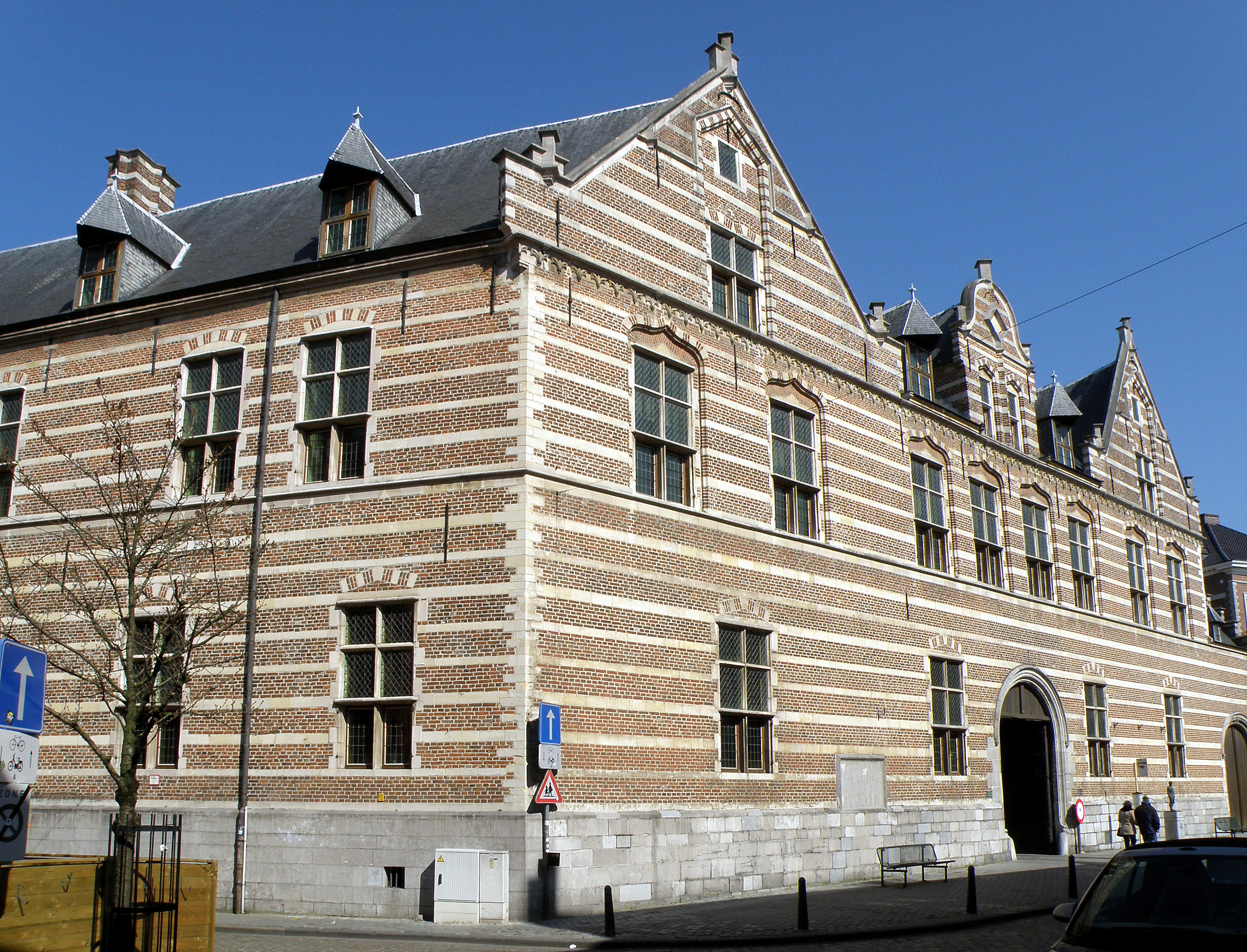 Hasselt (prov. Limburg, België). Voormalig refugiehuis van de abdij van Herkenrode, Maastrichterstraat nr.100.